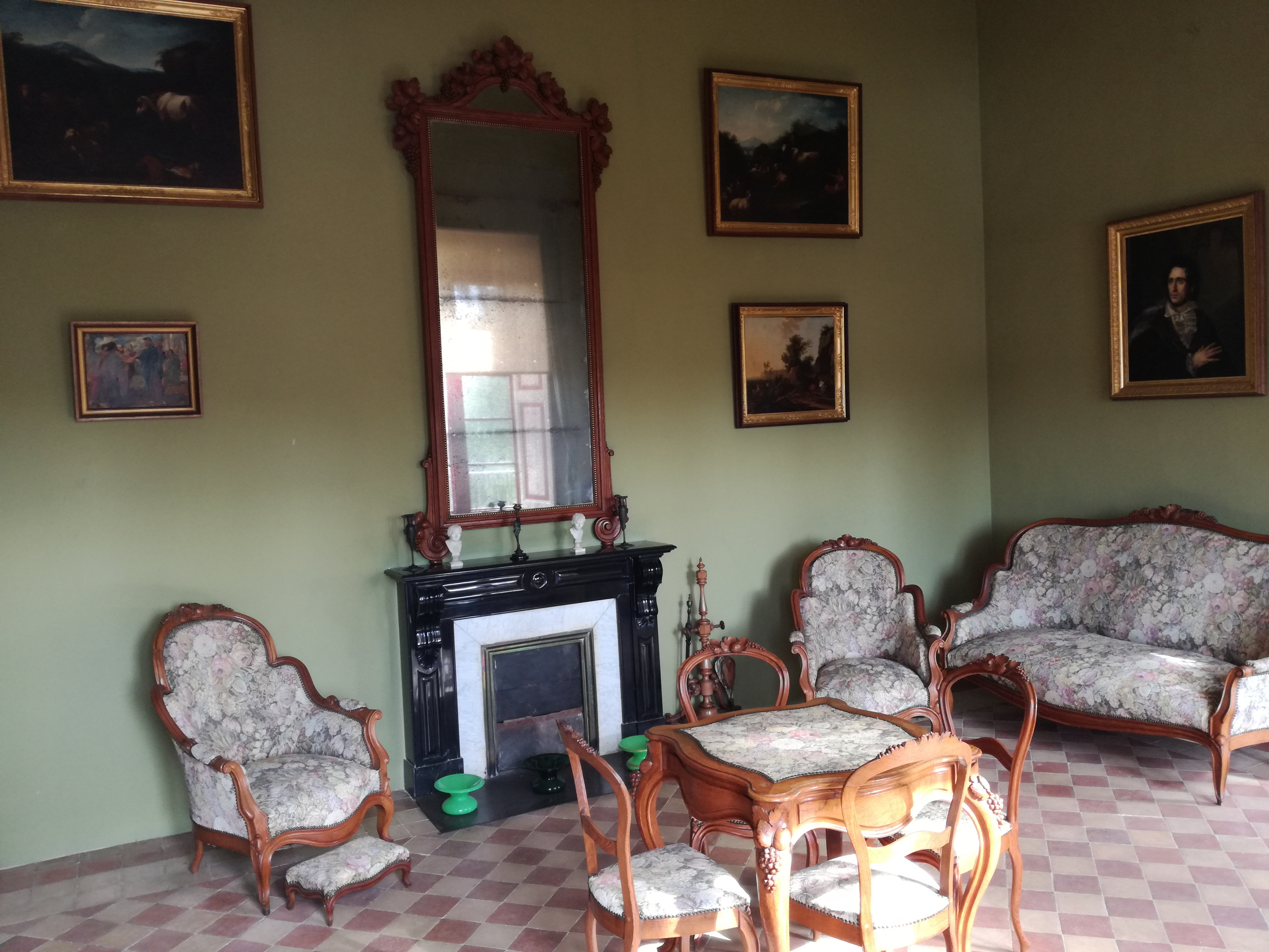 Espai de reunió, tertúlia i joc de la fam8lia Cabanyes